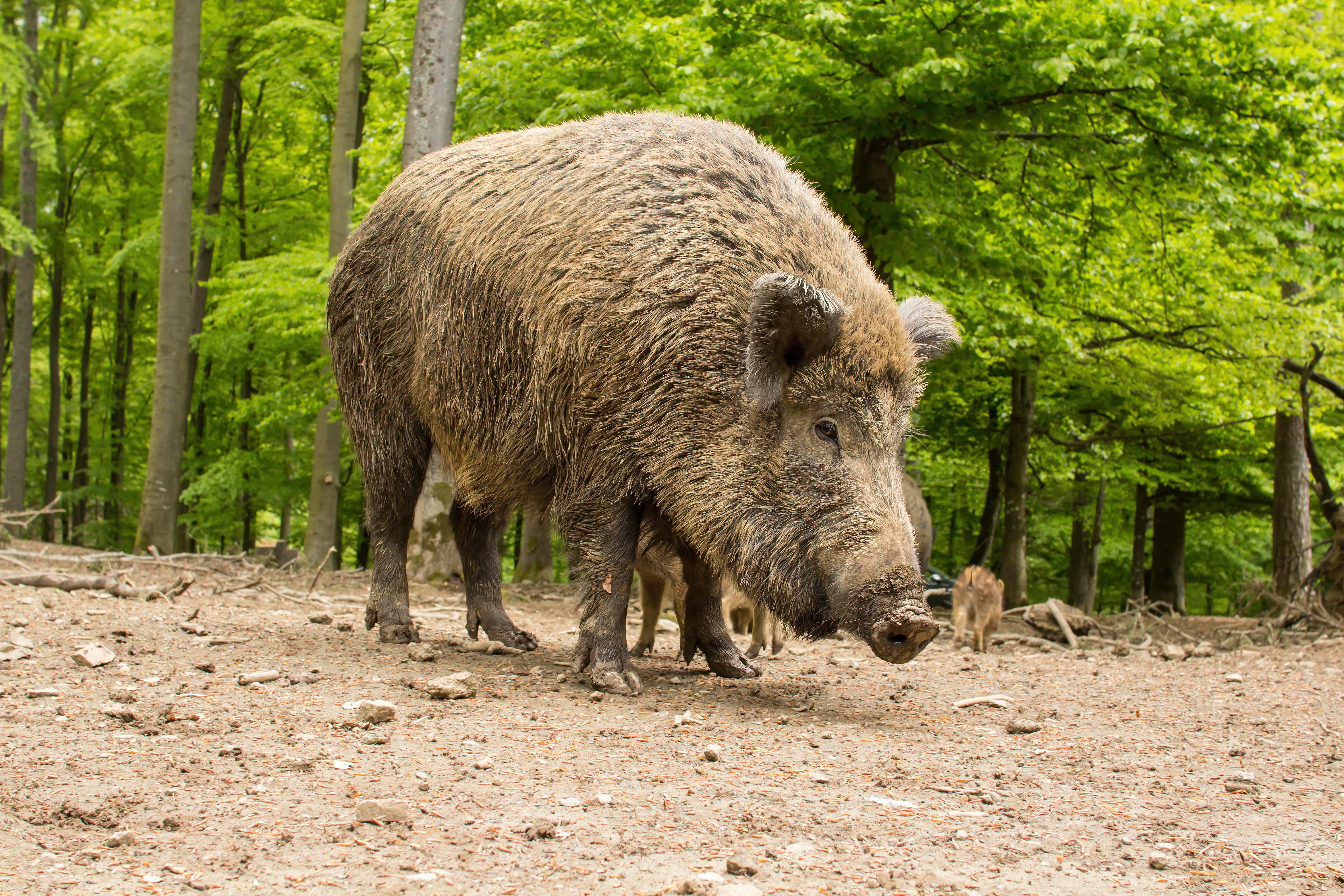 Wildsau im Wilderlebnispark Daun